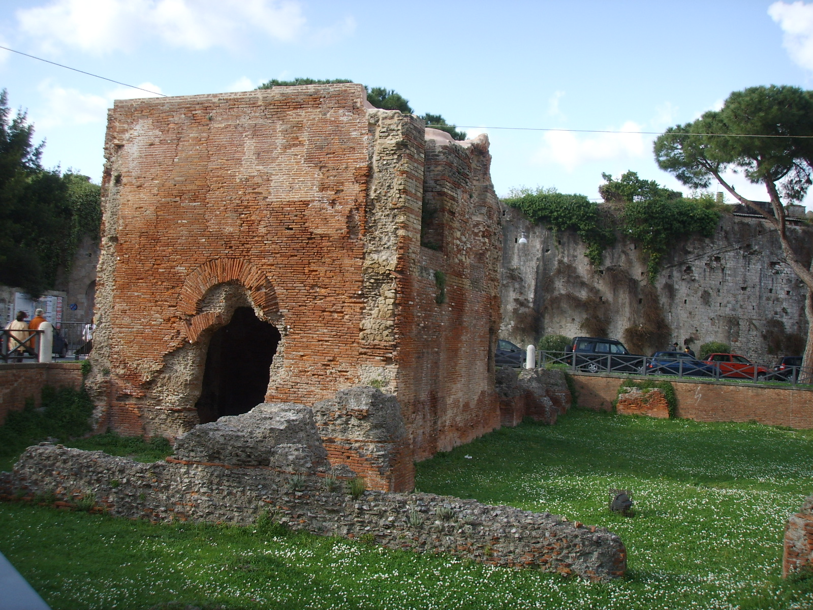 Bagni di nerone